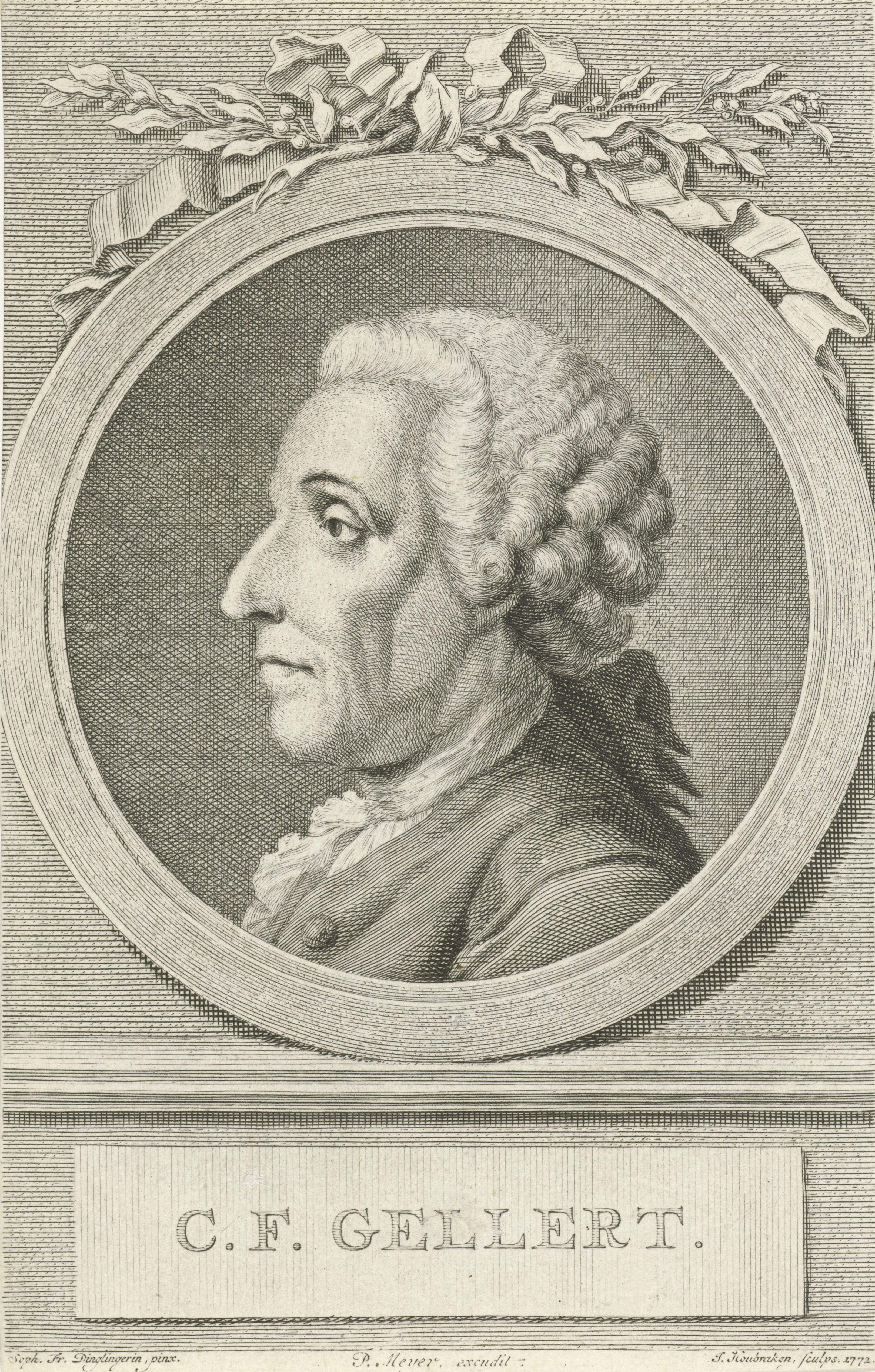 IdentificatieTitel(s): Portret van Christian Furchtegott GellertC.F. Gellert (titel op object)Objecttype: prent Objectnummer: RP-P-1937-1151Catalogusreferentie: Ver Huell 150Collectie Rijksmuseum-2(2)Opmerking: 2 staten in de collectie van het RijksmuseumOpschriften / Merken: verzamelaarsmerk, verso, gestempeld: Lugt 2228Omschrijving: Buste naar links van Christian Furchtegott Gellert in een medaillon, bovenaan versierd met een strik en lauriertakken. Het portret rust op een plint Waar: op een veld met zijn naam.VervaardigingVervaardiger: prentmaker: Jacob Houbraken (vermeld op object)naar schilderij van: Sophie Friederike Dinglinger (vermeld op object)uitgever: Pieter Meyer (vermeld op object)Plaats vervaardiging: AmsterdamDatering: 1772Fysieke kenmerken: gravureMateriaal: papier Techniek: graveren (drukprocedé)Afmetingen: blad: h 174 mm × b 111 mmOnderwerpWie: Christian Fürchtegott GellertVerwerving en rechtenVerwerving: onbekend 1937Copyright: Publiek domein